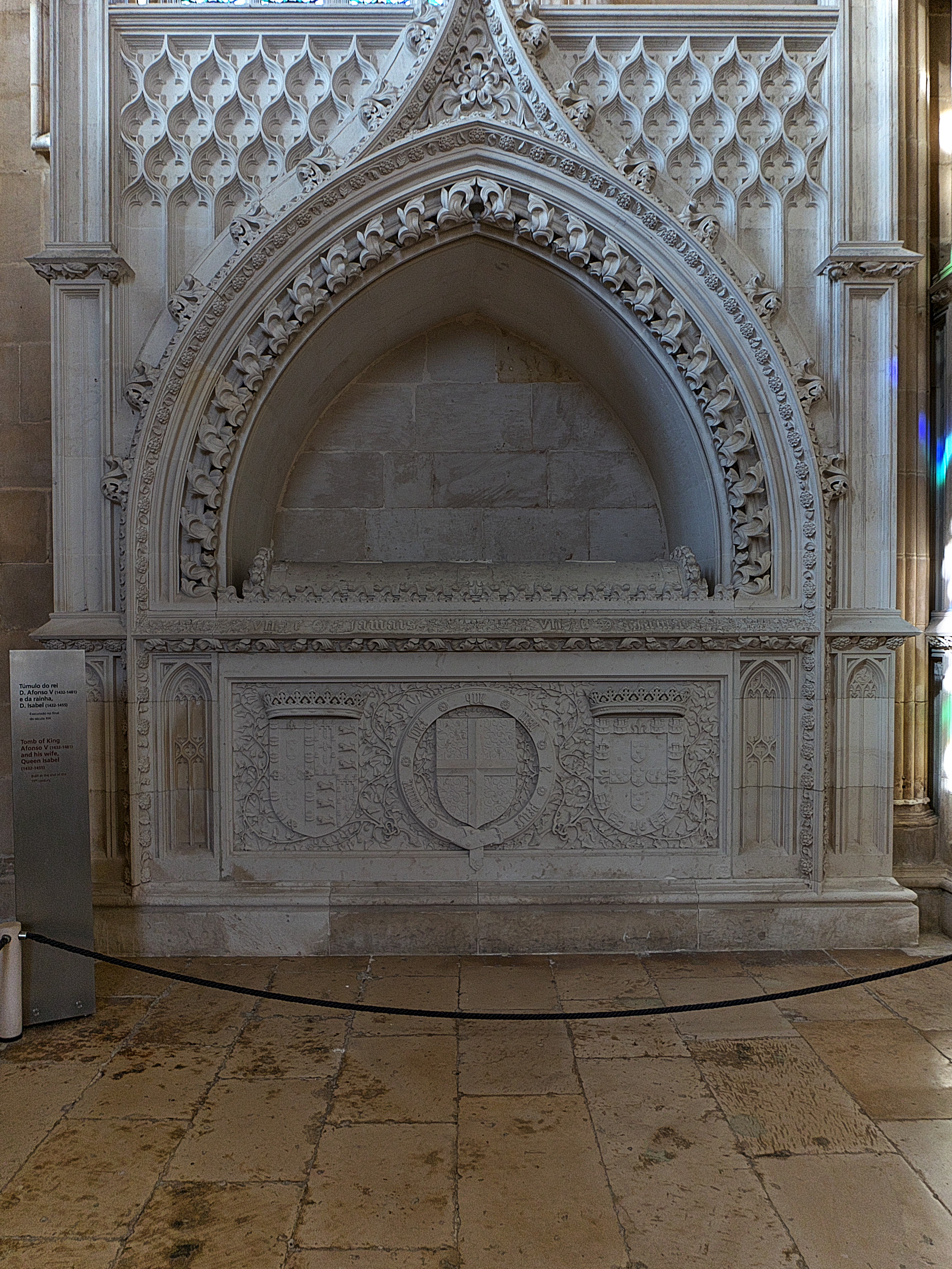 Capilla de los Fundadores (Monasterio de Batalha). Sepulcro de Alfonso V de Portugal y de Isabel de Portugal.